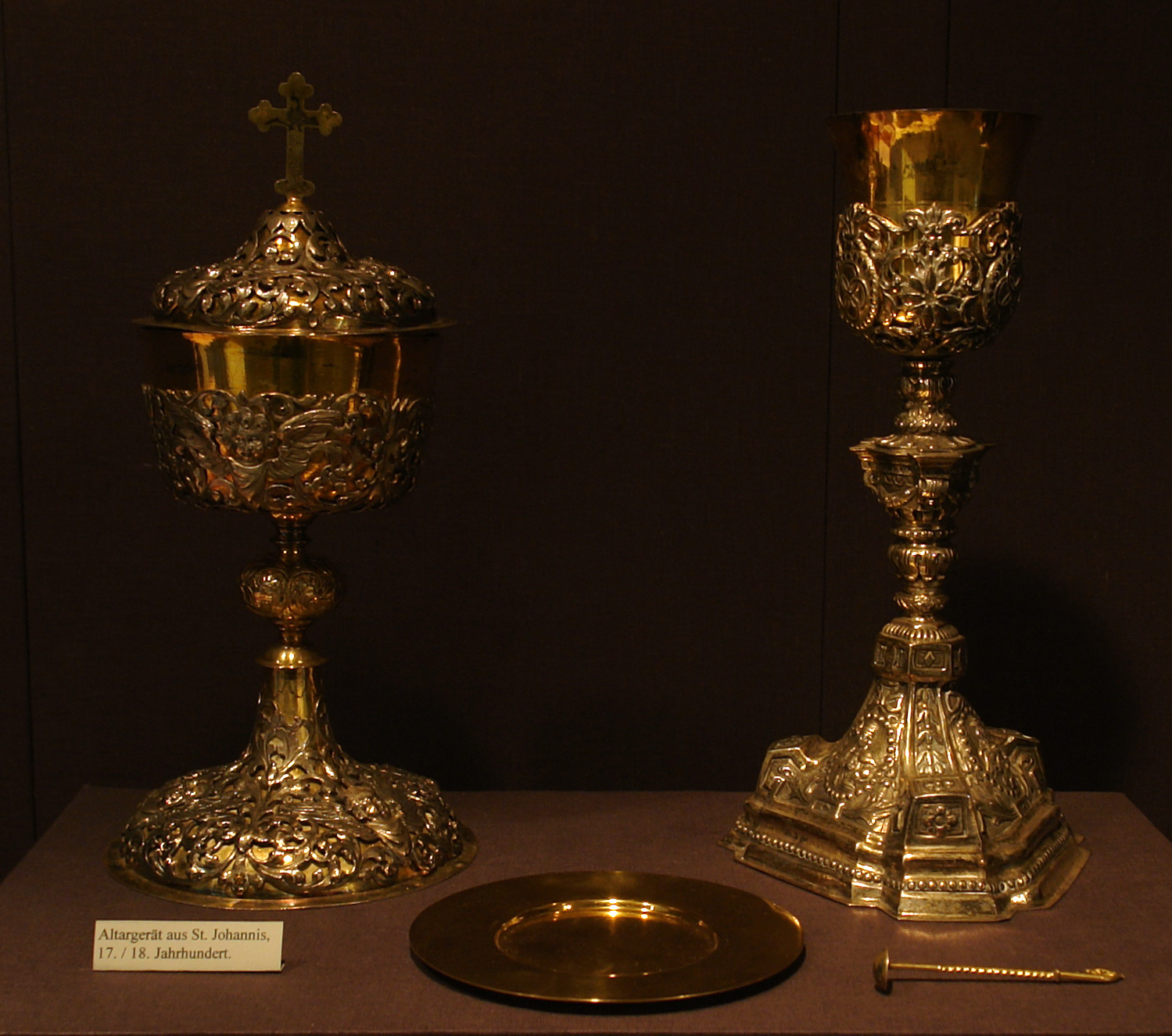 Bremer Dom-Museum: Altargerät aus St. Johannis, 17./18. Jahrhundert